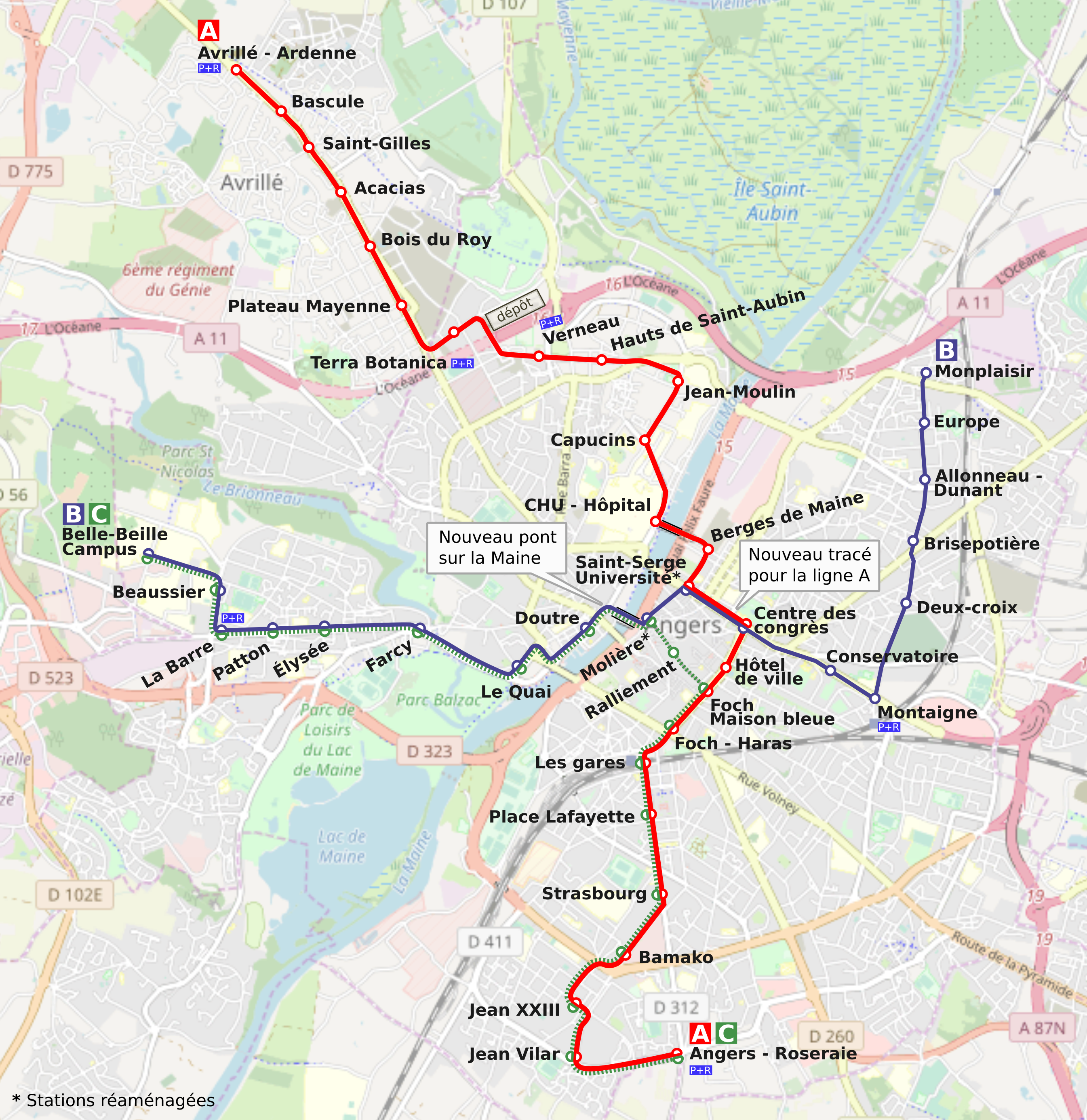 Plan illustrant les trois lignes prévues du tramway d'Angers, à l'horizon 2020. Source concernant le tracé des lignes. This map may be incomplete, and may contain errors. Don't rely solely on it for navigation.